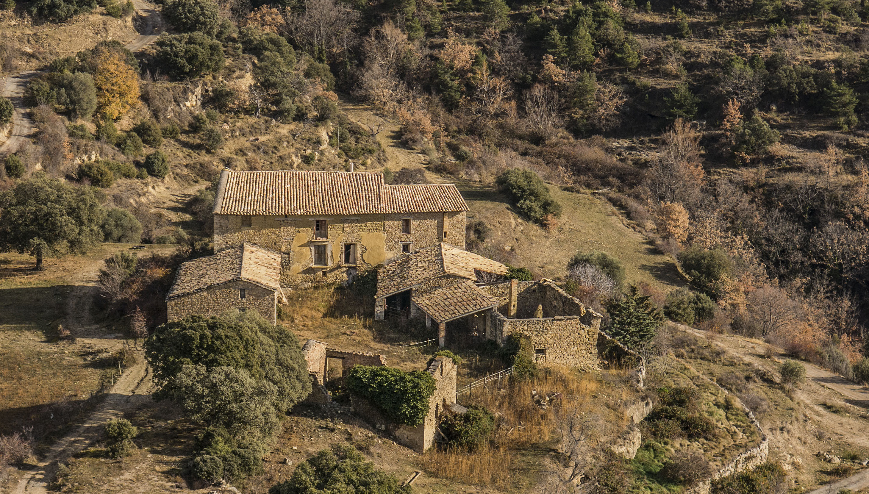 Situada sota el turó del Castell de Fontova, a la Ribagorça aragonesa.